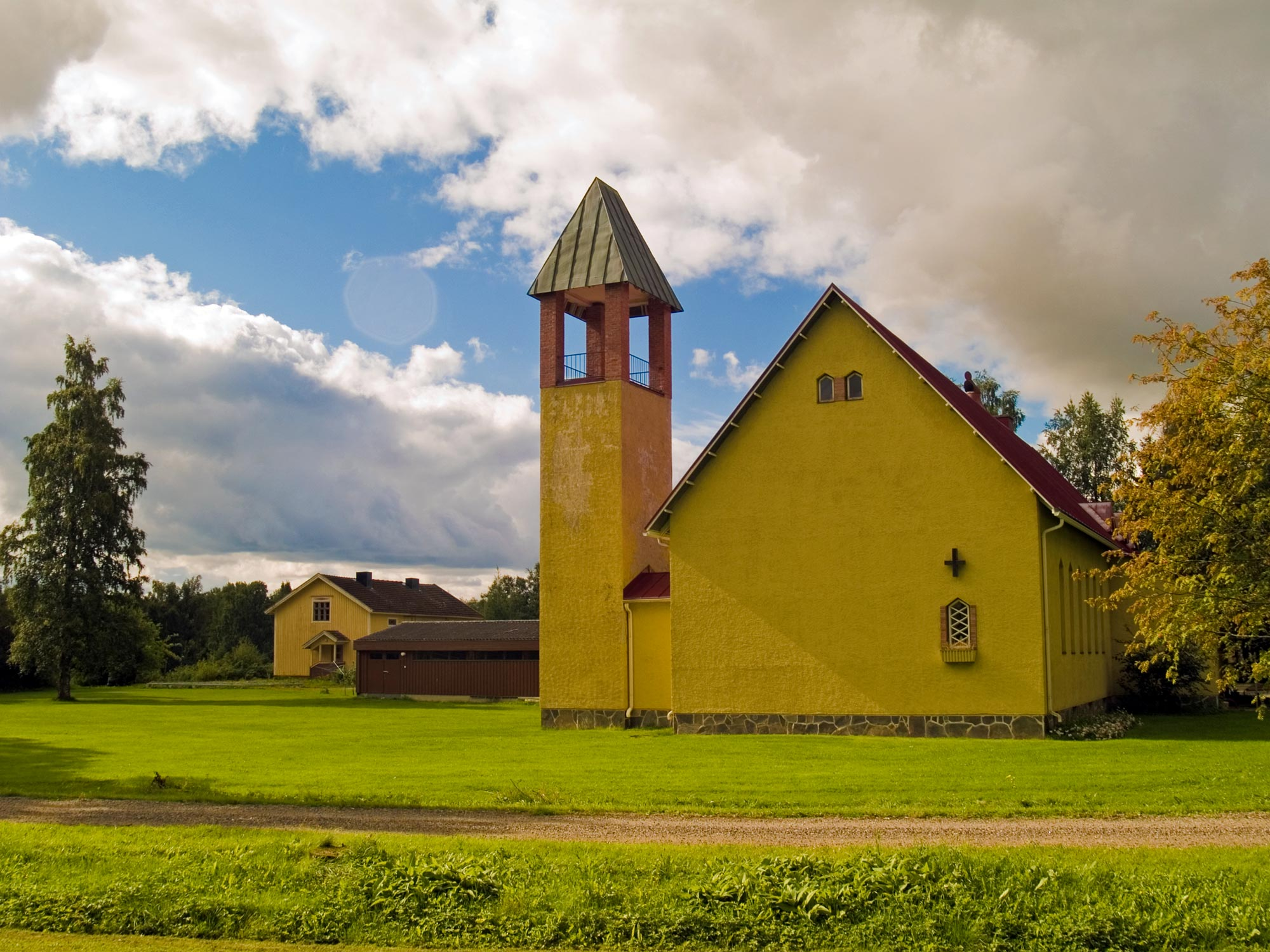 Koskenkorvan seurakuntatalo, Ilmajoen seurakunta. Arkkitehti Mikael Nordenswan 1953.